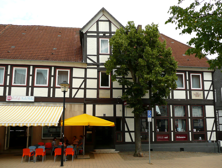 Vorsfelde Lange Strasse 36